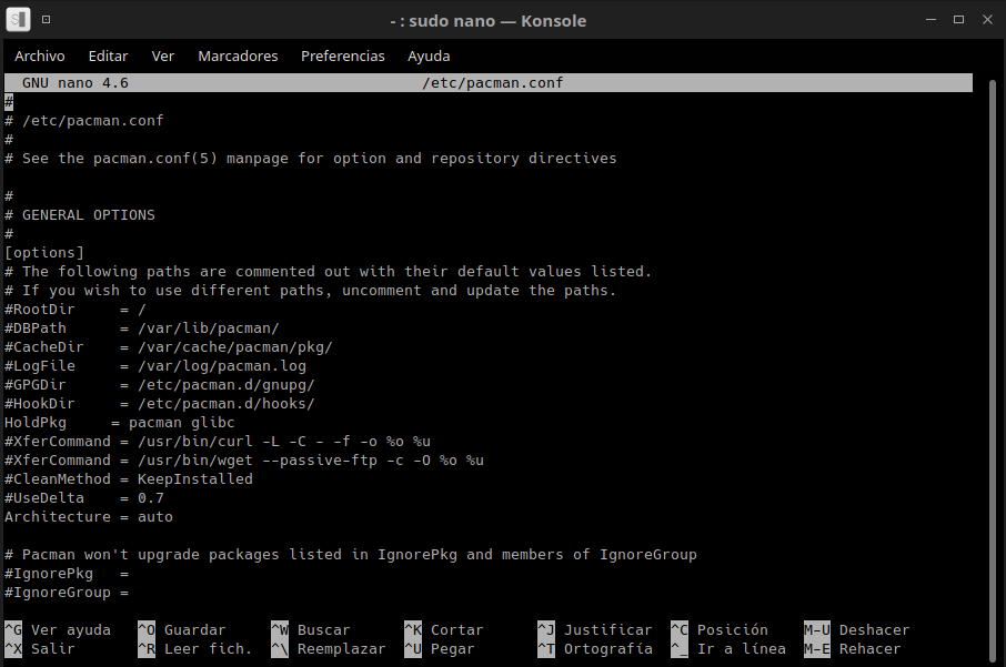 Archivo plano de configuración pacman.conf, necesario para establecer parámetros del administrador de descargas Pacman.